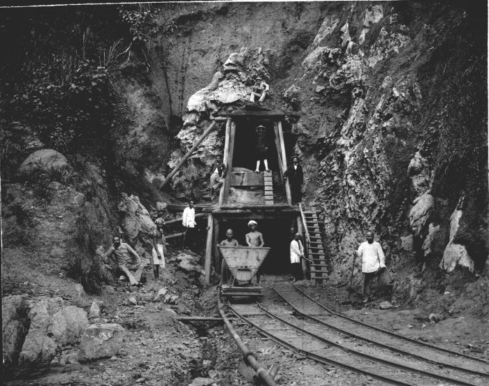 Foto. Tunnelbouw bij de steenkolenmijnen van Sawahloento